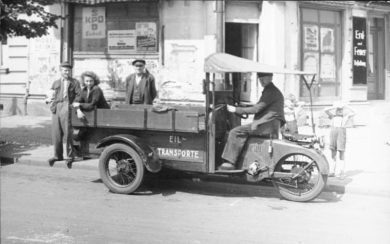 Berlin, Eiltransport ADN-ZB/SNB "Eiltransport" in Berlin 1946. [Fahrzeug, zusammengebaut aus Motorrad und Kleintransporter]